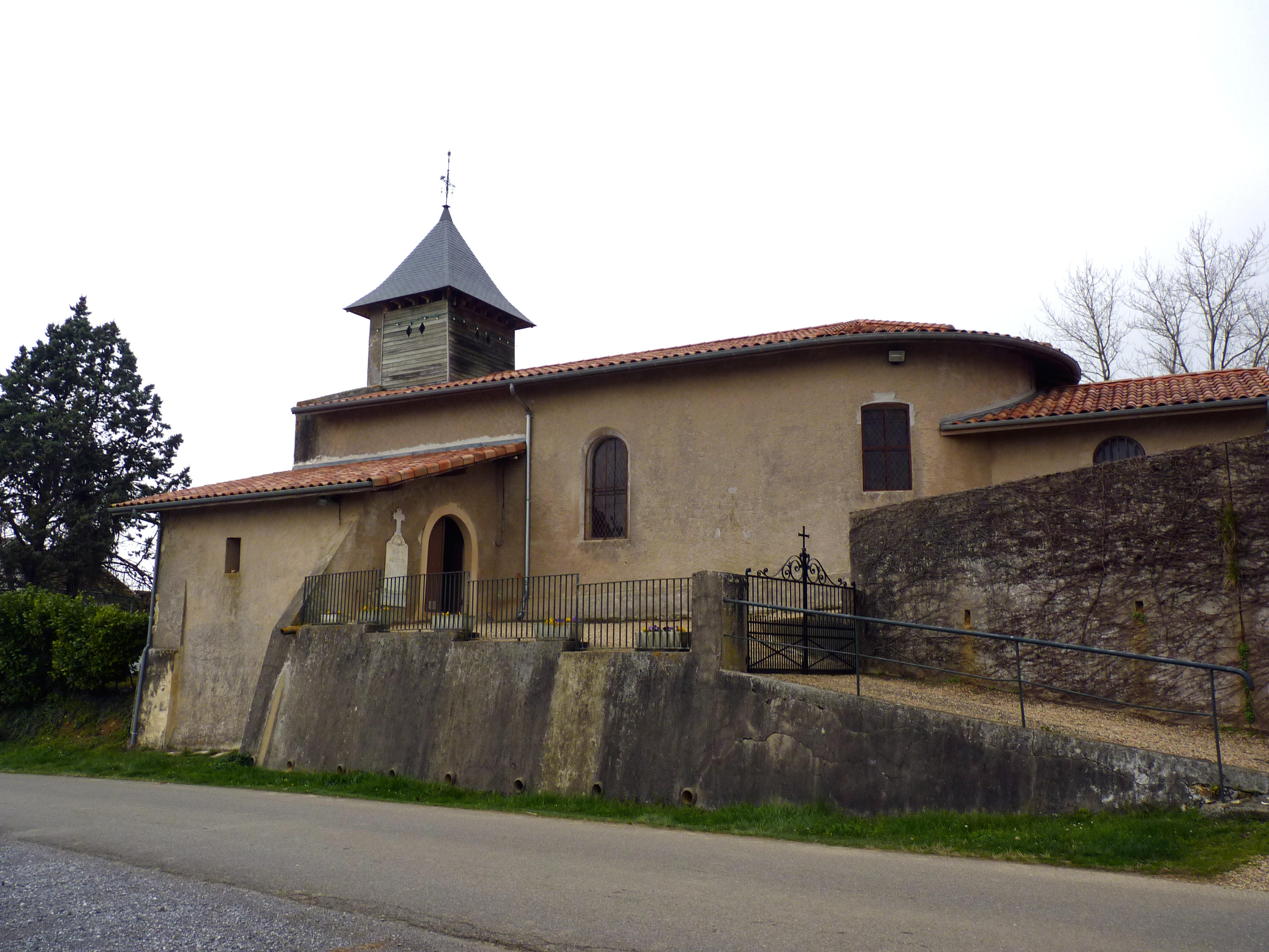 Eglise de Gibret